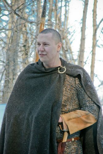 Плащ викинга, застегнутый на фибулу.